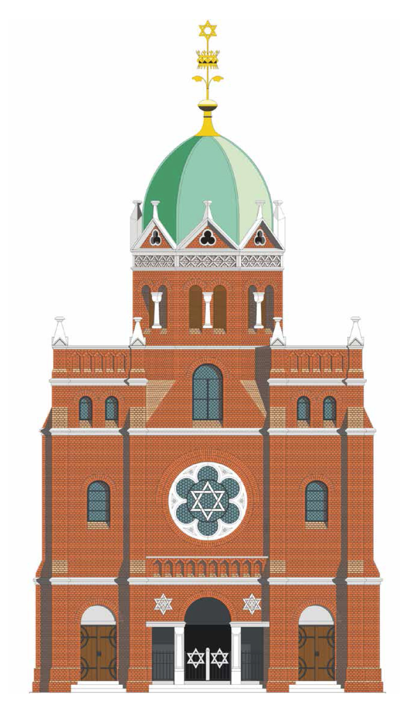 Synagoga w Kłodzku